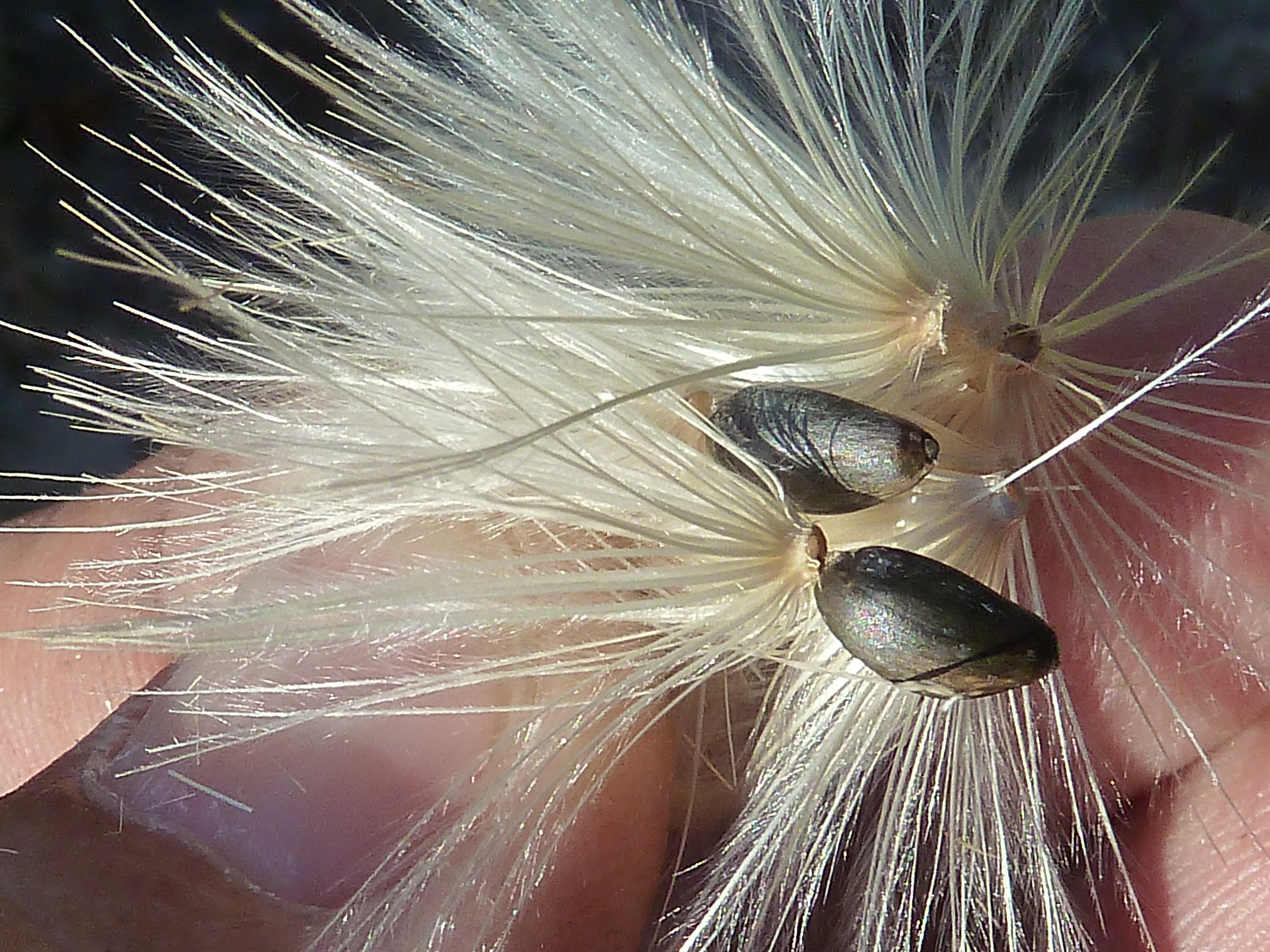 Cynara cardunculus scolymus L., var. «Blanca de Tudela»: Cipselas con vilano caedizo, de pelos basalmente plumosos y distalmente escábridos, soldados en un anillo por sus bases. - La Huerta/ El Canalillo (Albatera, Alicante, España).